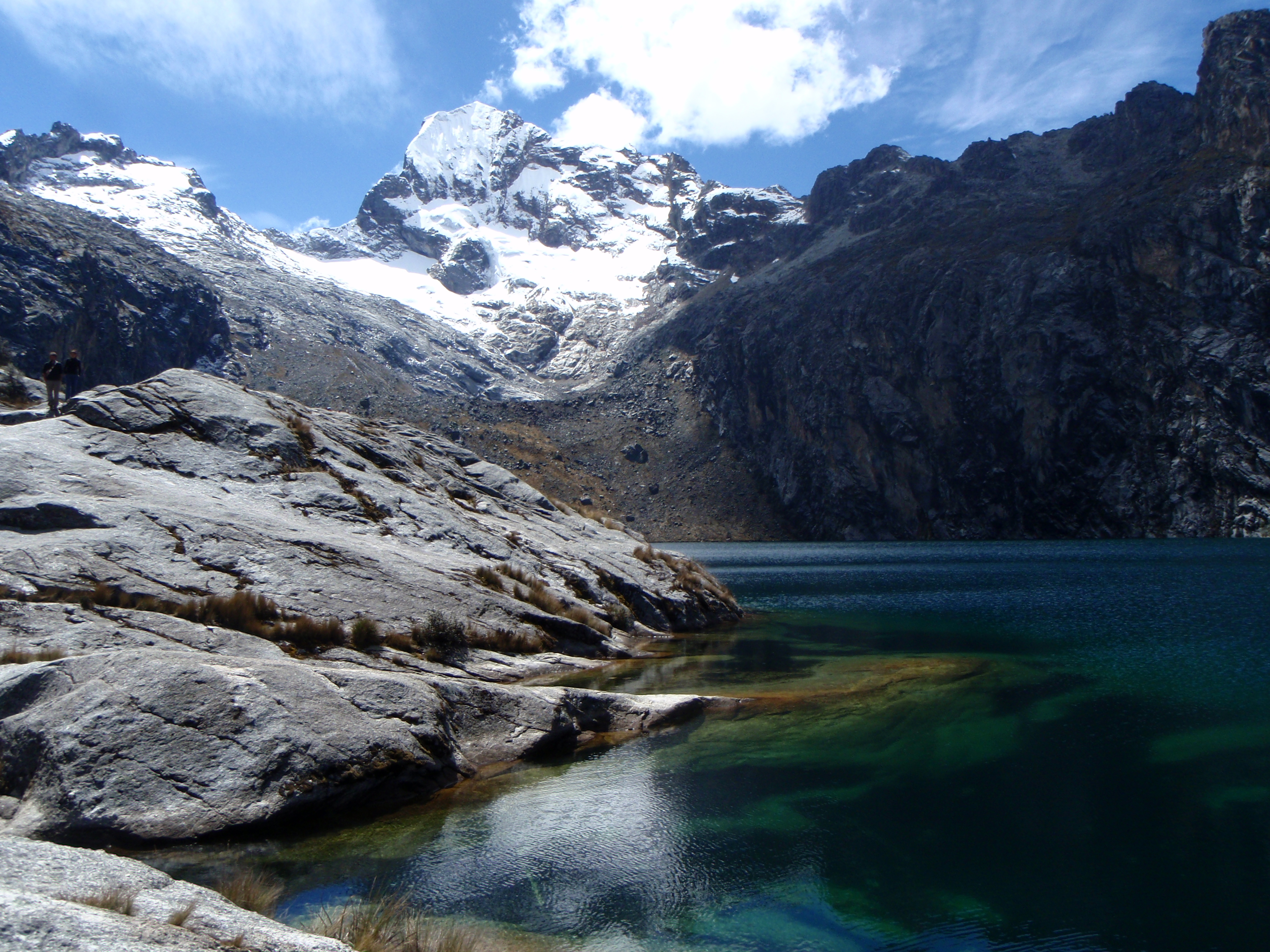 Foto tomada en julio de 2009.